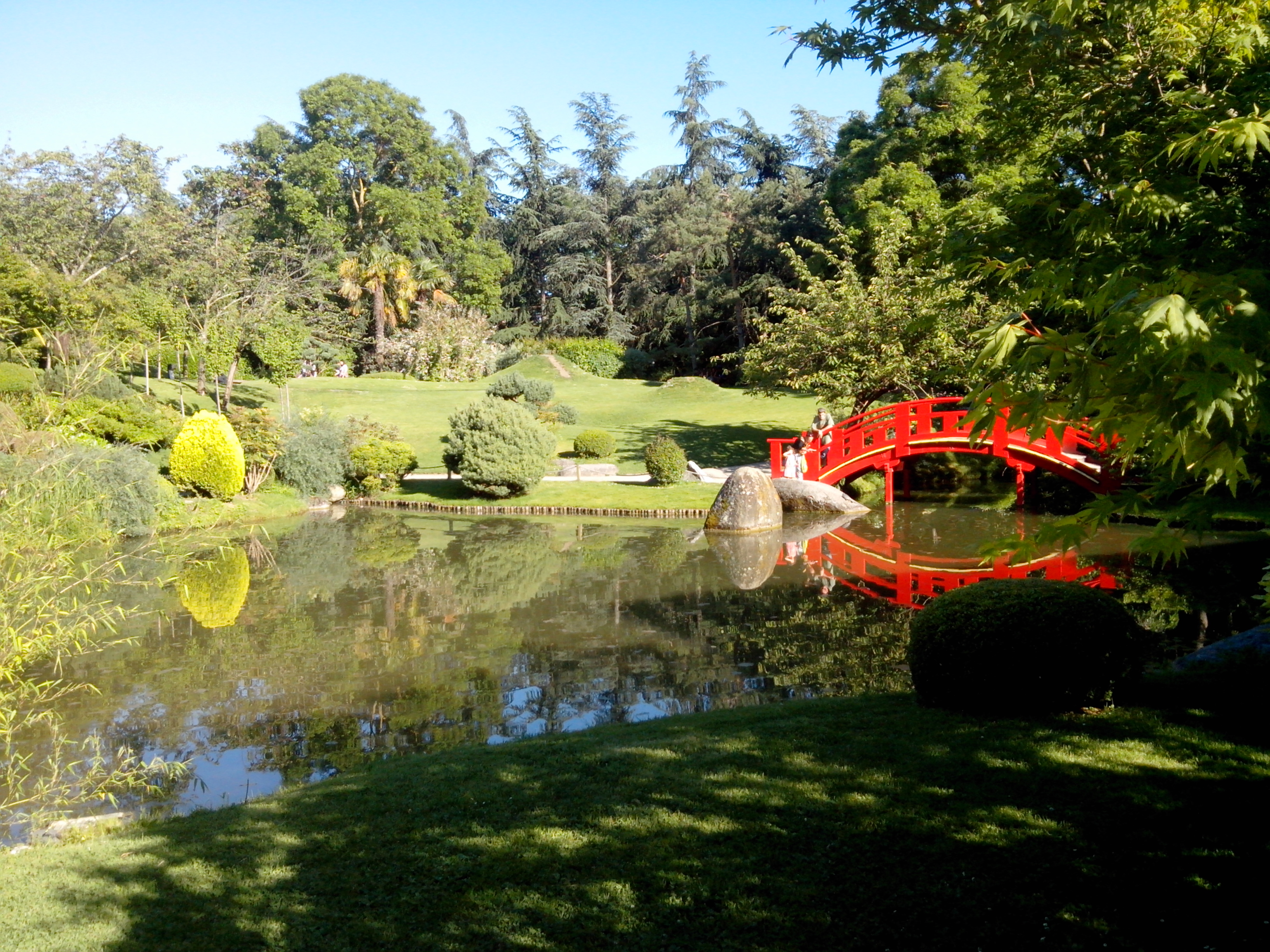 Vue du Jardin Japonais de Toulouse, France. Juin 2013